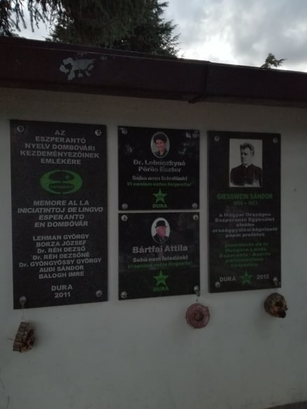 A dombóvári eszperantó panteon emléktáblái (Dombóvár, Egyházi temető ravatalozójának K-i Homlokzatánál)